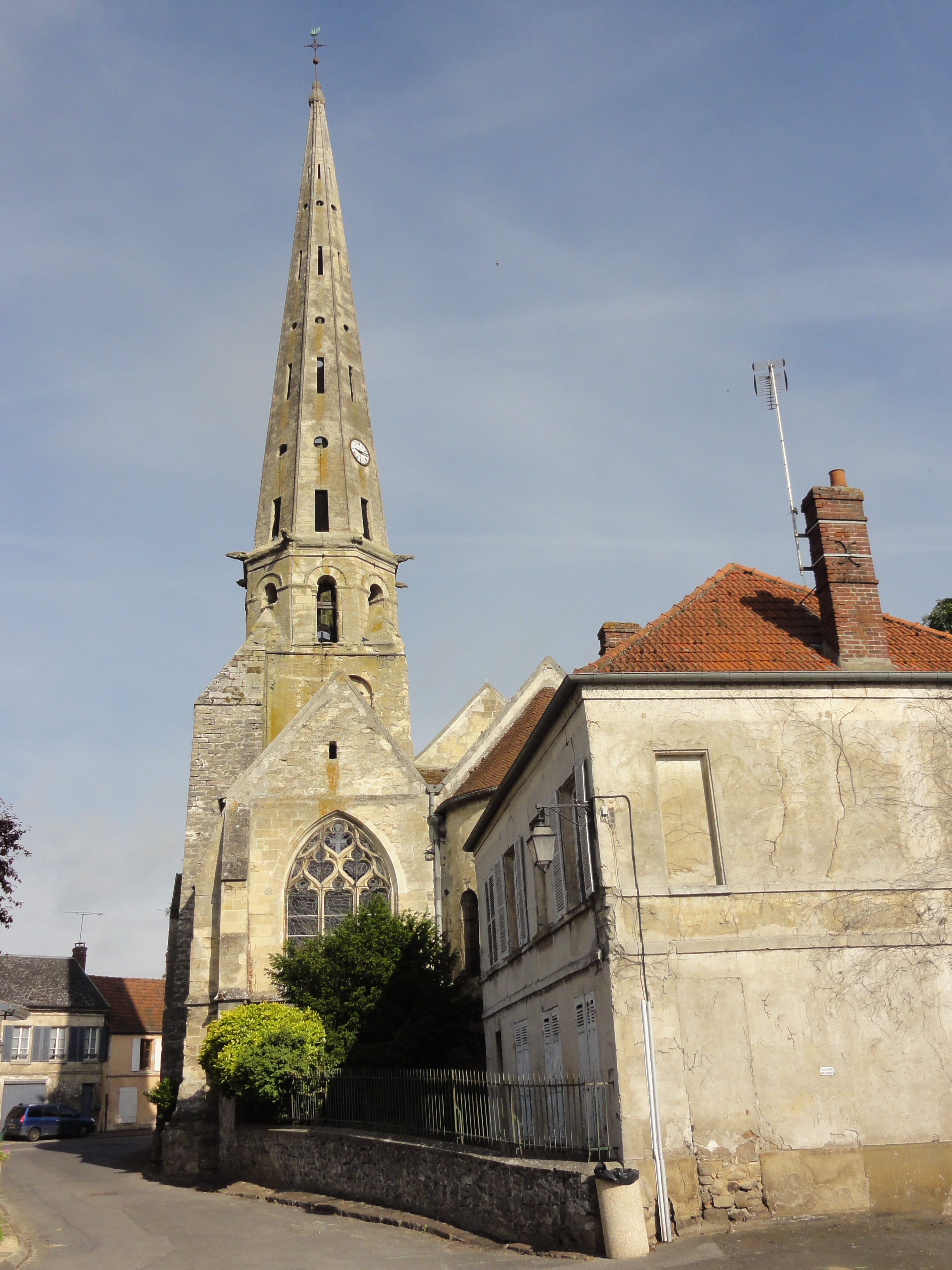 Église Saint-Pierre-et-Saint-Paul d'Acy-en-Multien (voir titre).